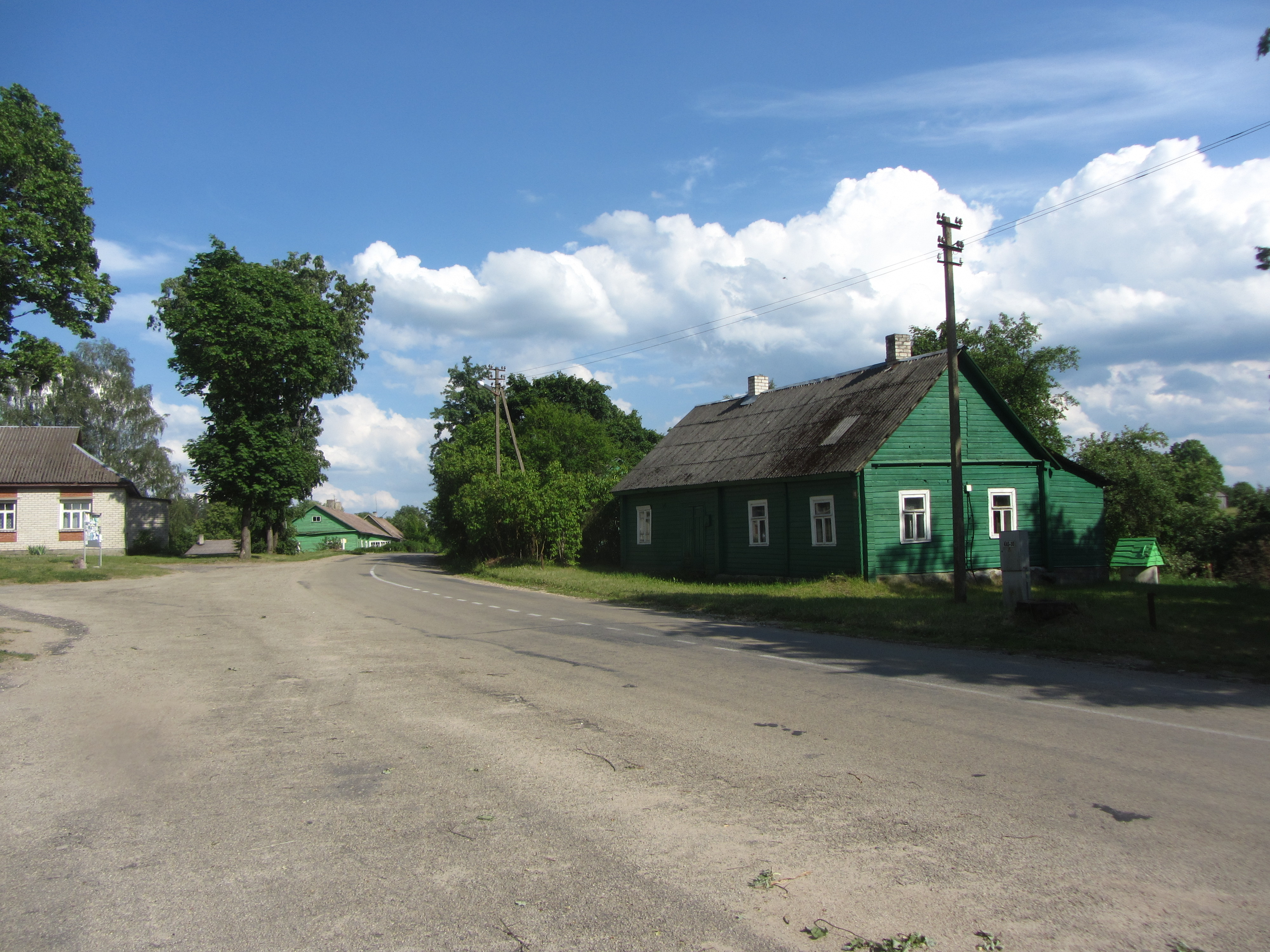 Dusmenys, Lithuania